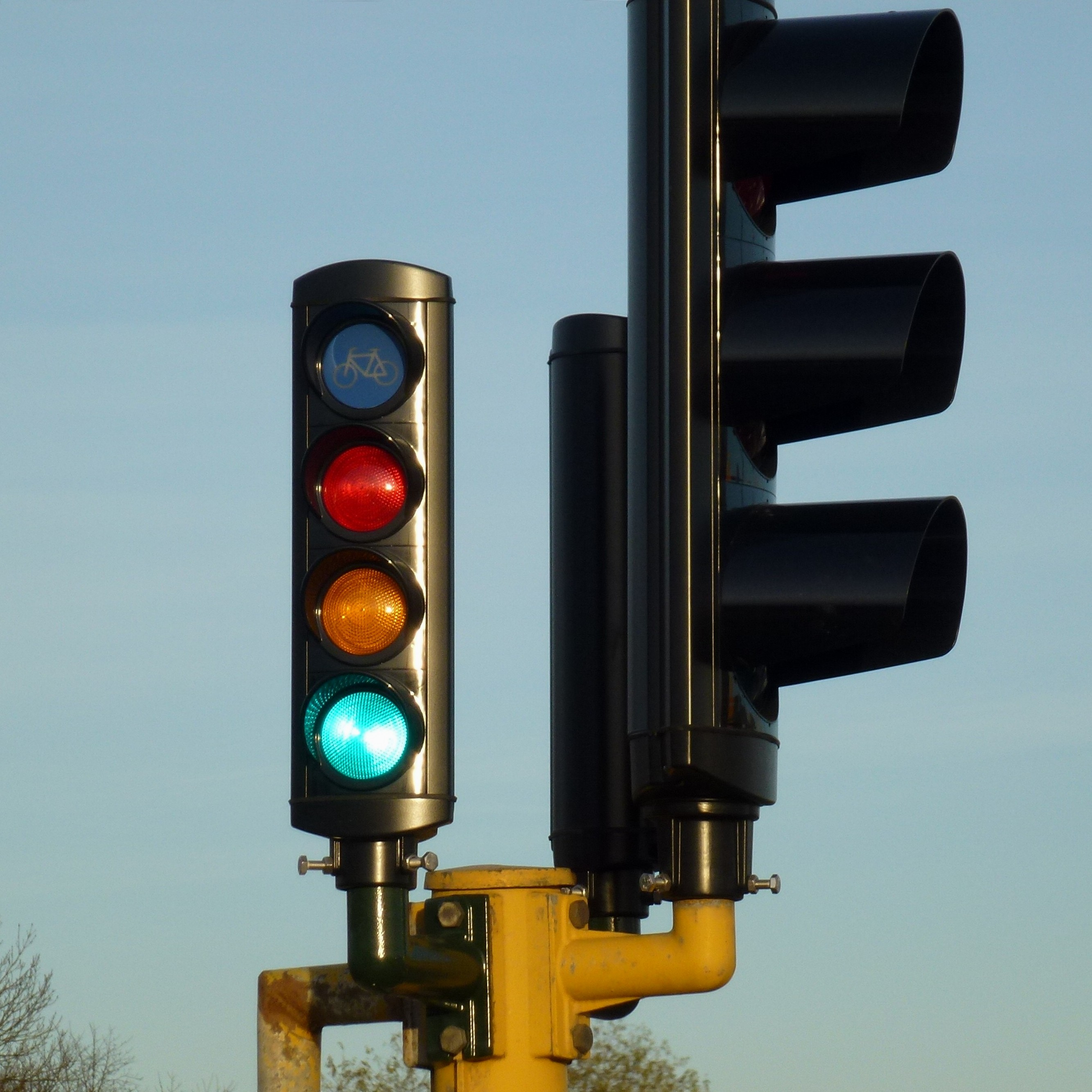 Trafiksignal cylel gönt